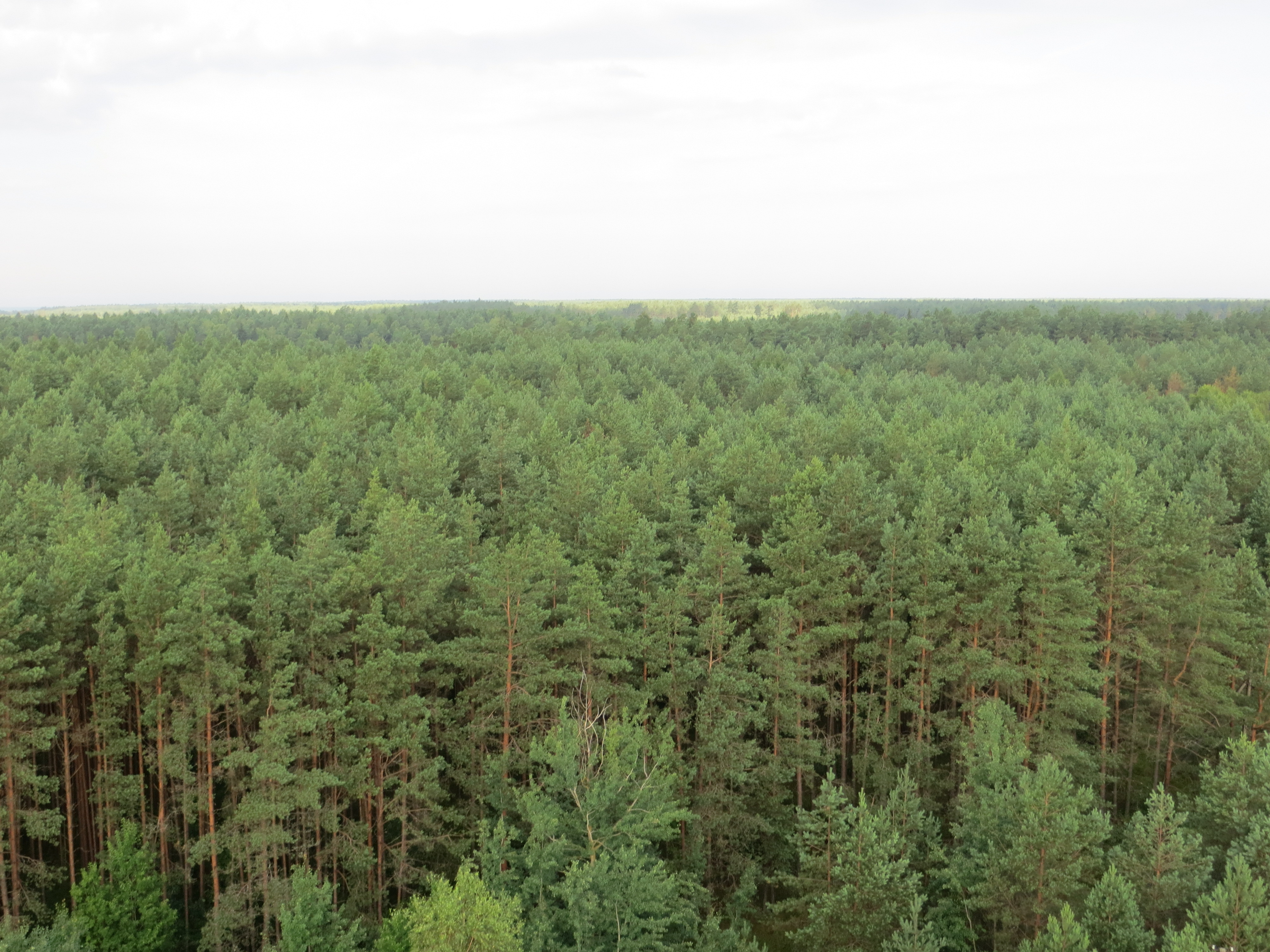 Madžiūnai, Lithuania